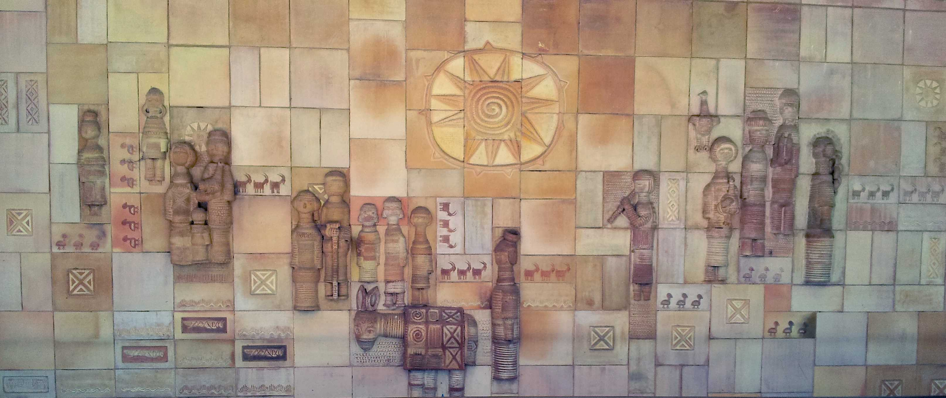 Relife